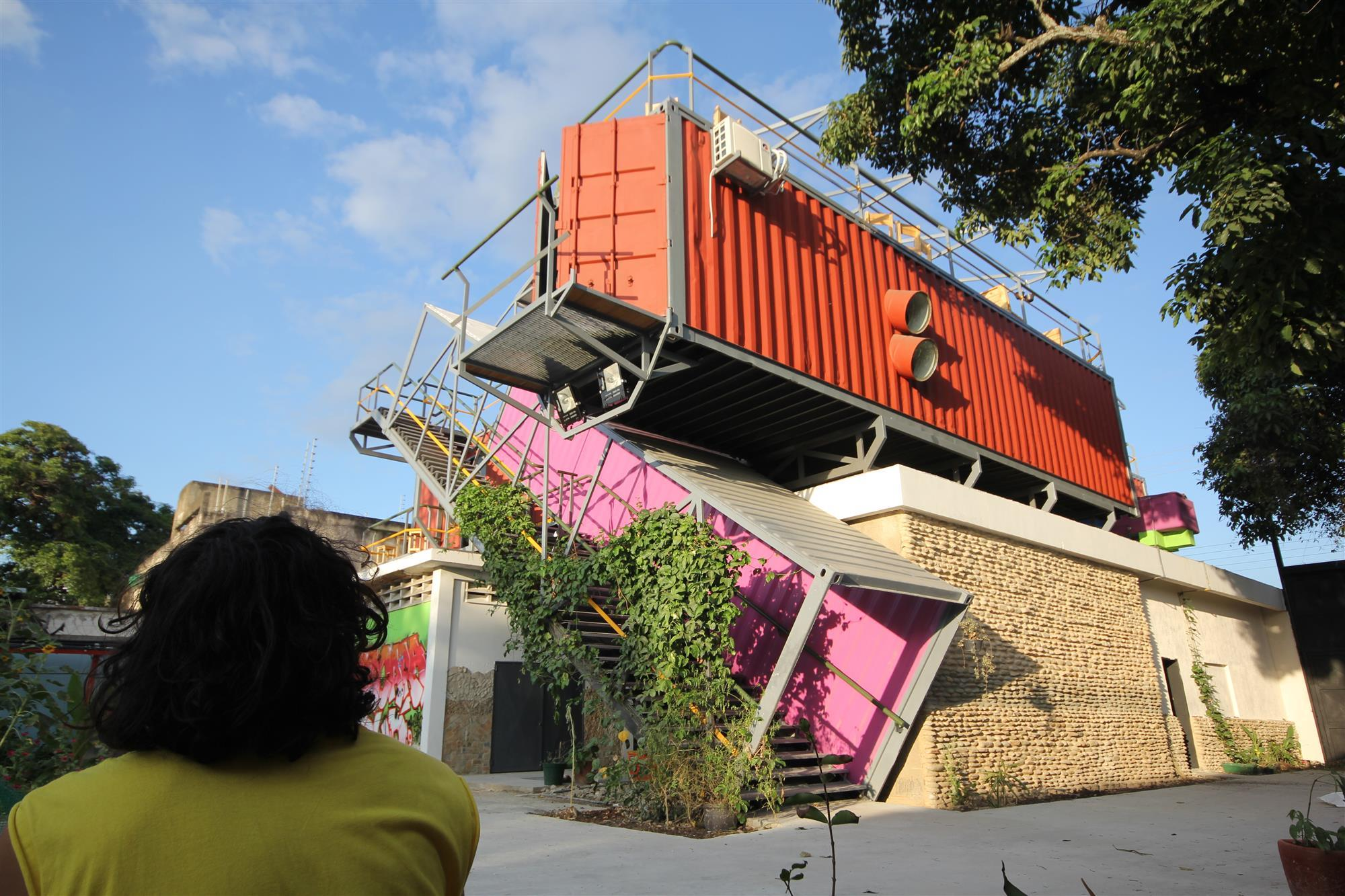 CULTURAL PRODUCTION ZONE 01 Photo Marcos Coronel